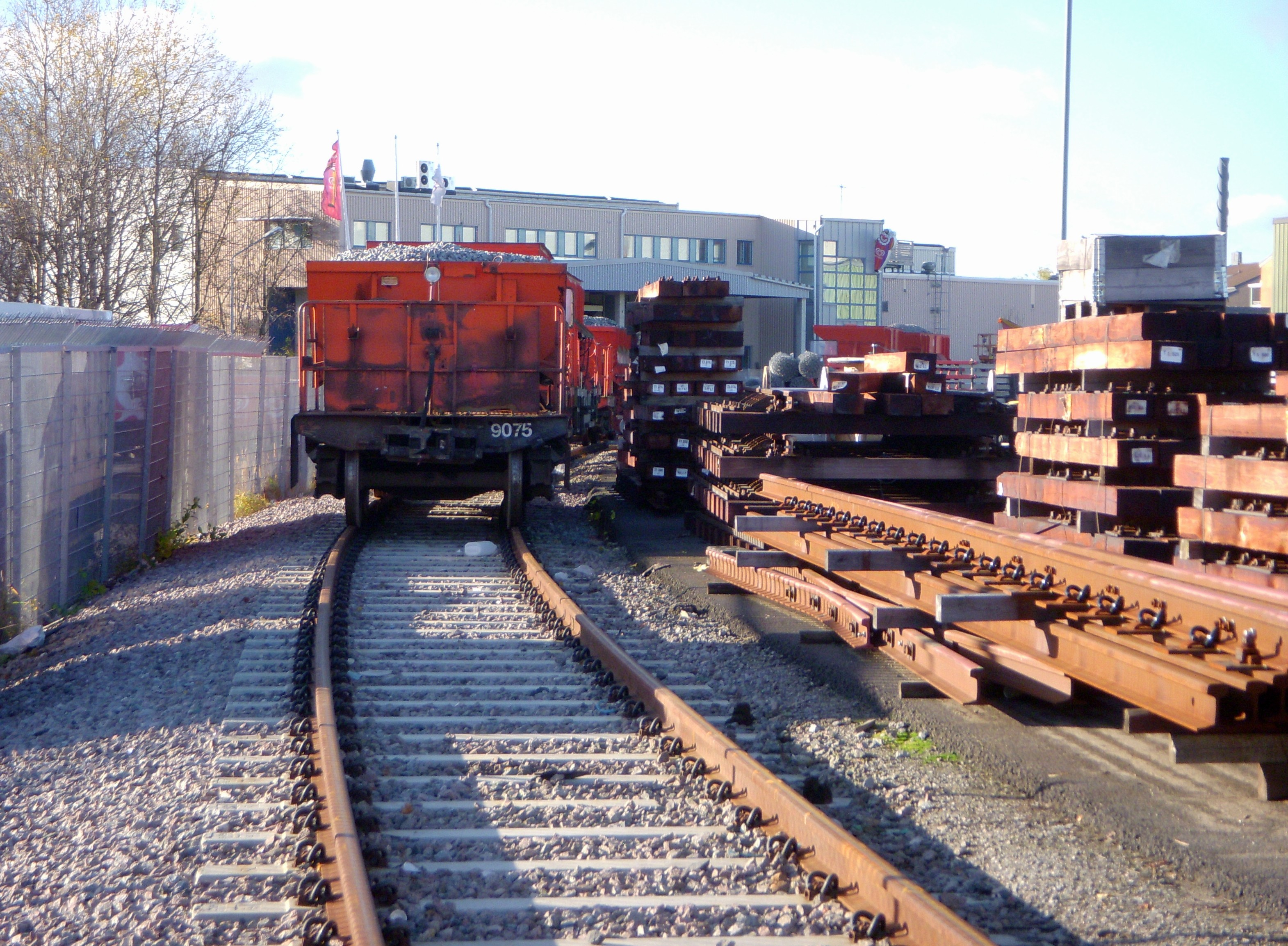 Slakthusområdet, Slakthusspåret